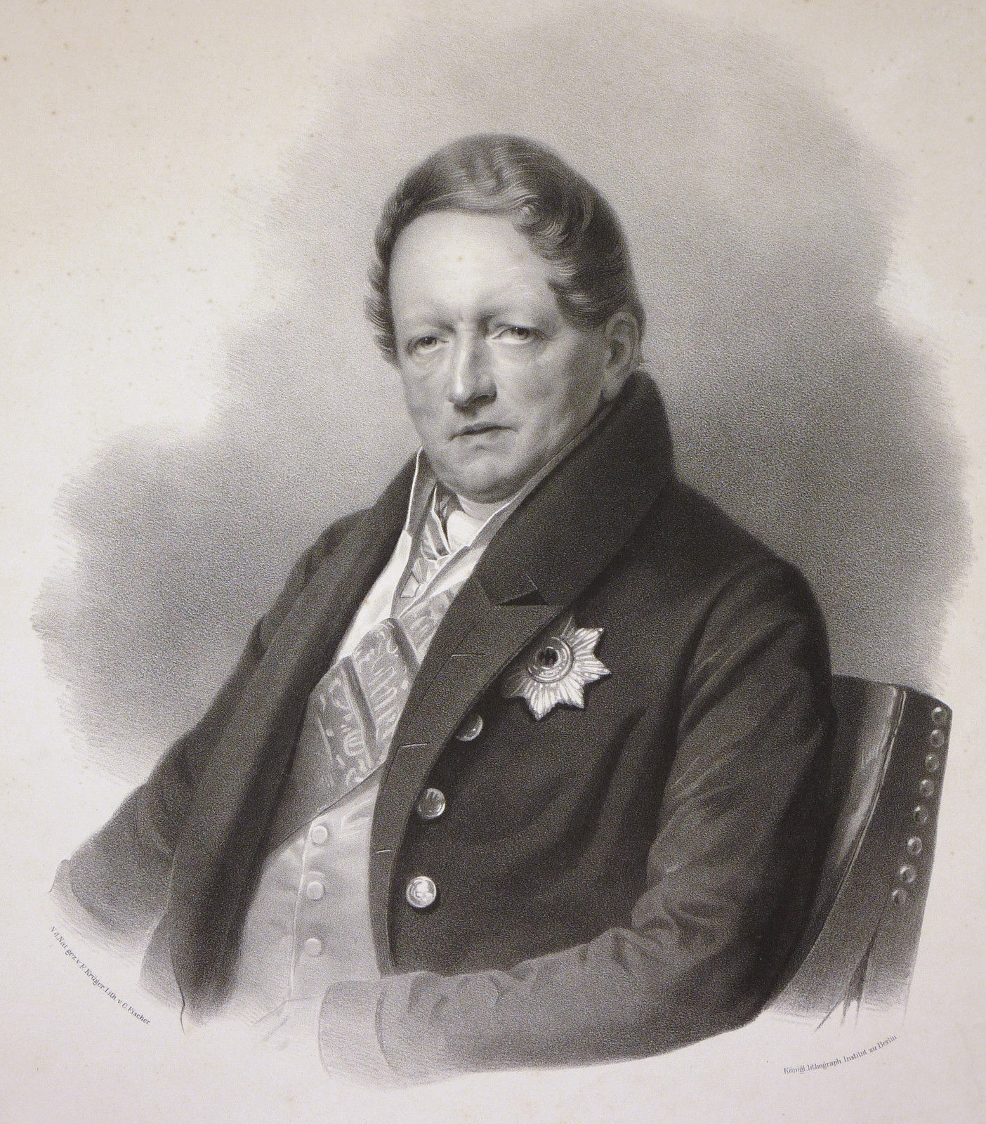 Von der Natur gezeichnet v. F. Krüger, Lithografie von C. Fischer Königl. Lithograph. Institut zu Berlin, ca. 1820